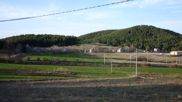 Villaggio cagno. La seconda parte del villaggio posto di fronte la chiesa e la vecchia scuola. Licensing Categoria:San Giovanni in Fiore